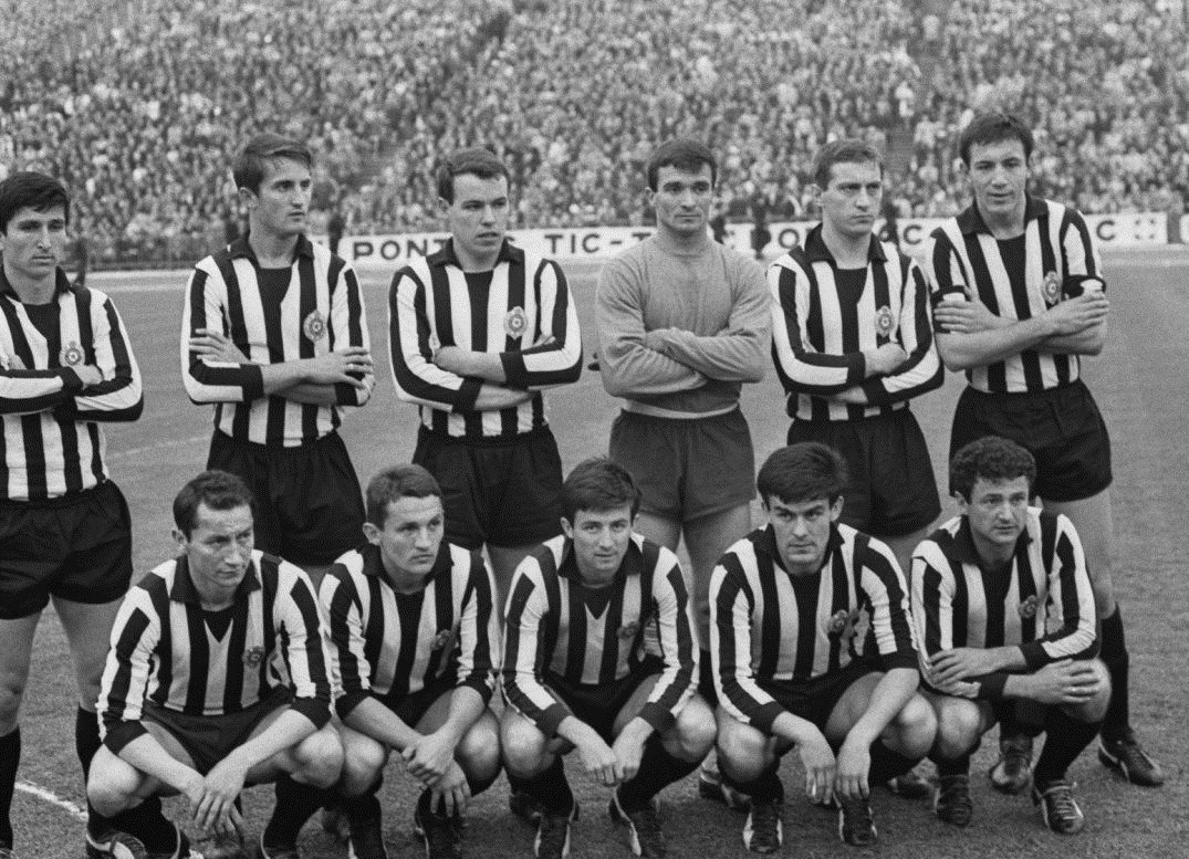 FK Partizan voorafgaand aan de Europacup I-finale tegen Real Madrid.